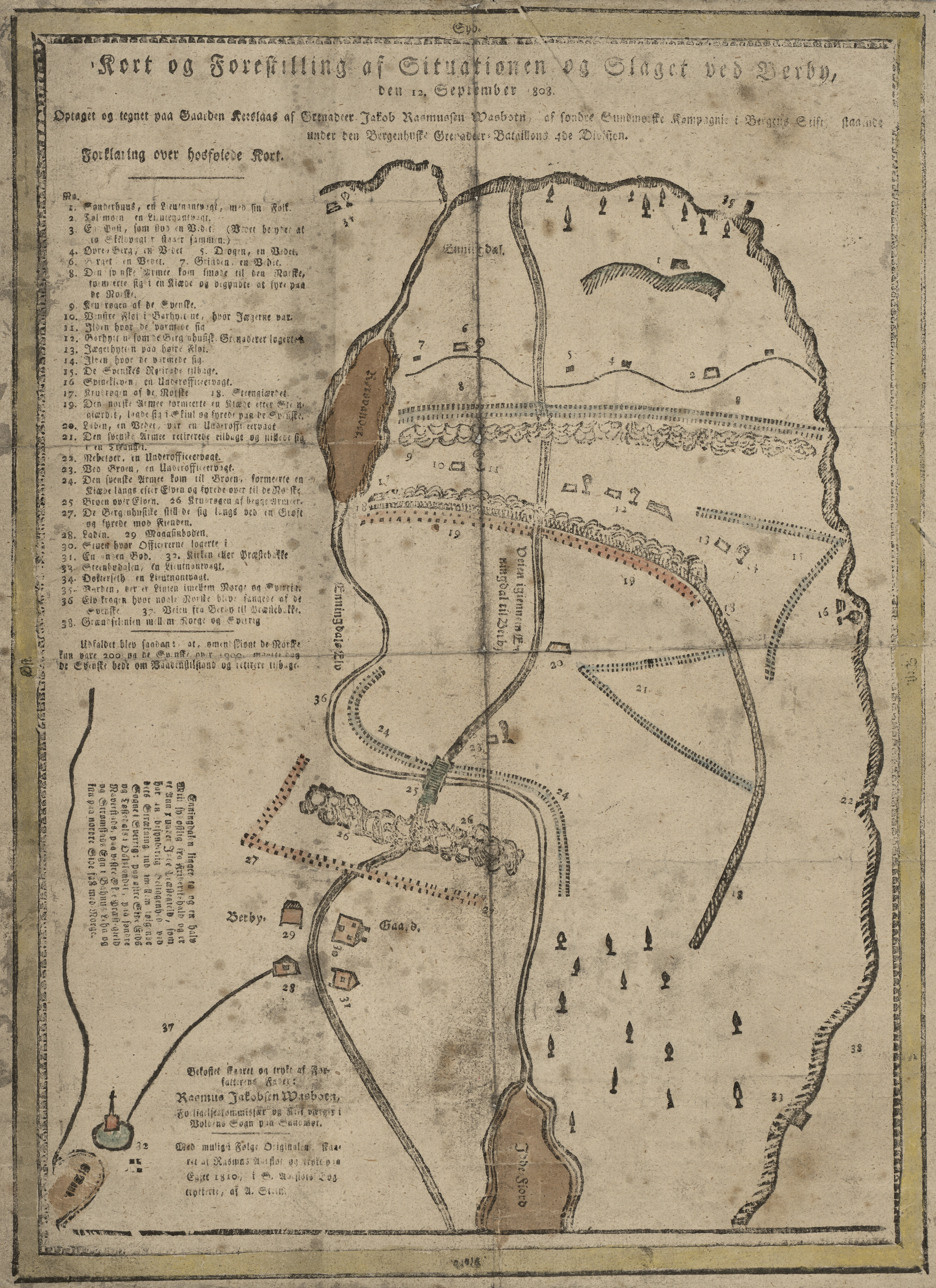 Kart fra Nasjonalbibliotekets kartsamling. Kartet er gitt ut i (1810) og viser Bergby, Østfold.